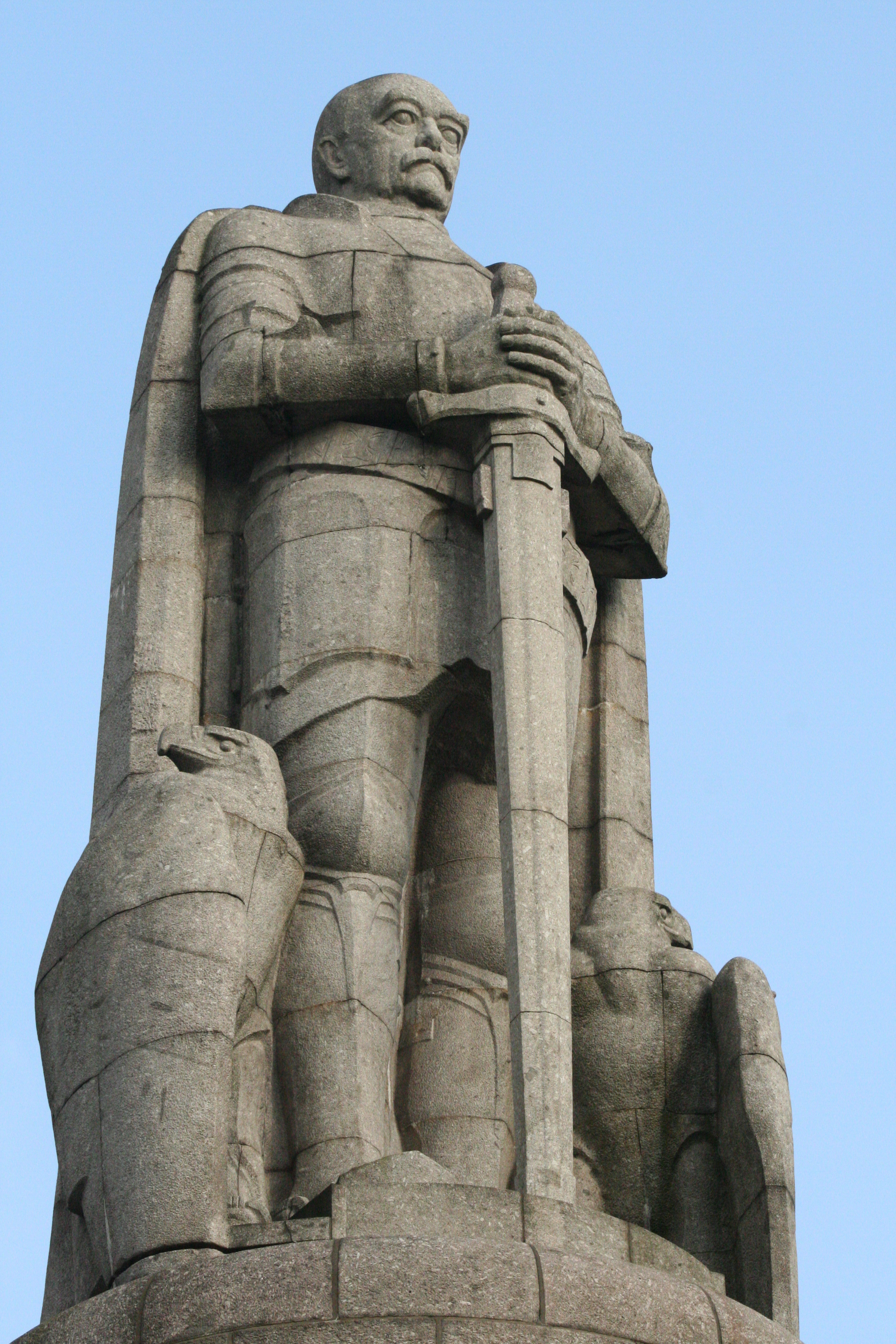 Bismark-Denkmal in Hamburg